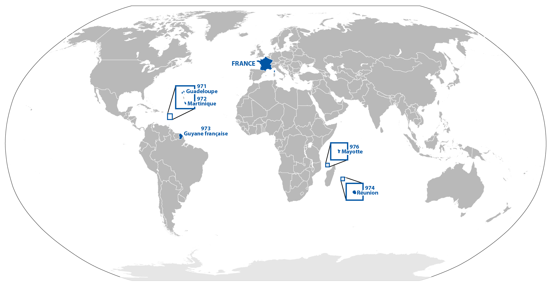 Carte des Départements d'outre mer